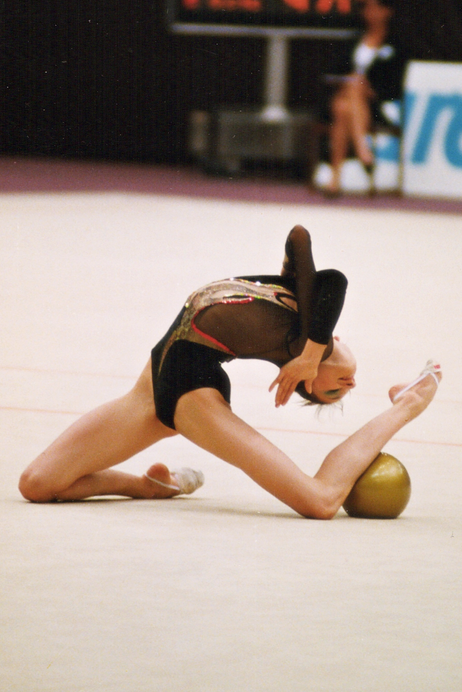 La gimnasta española Esther Domínguez en el Campeonato Europeo de Budapest en 1999.